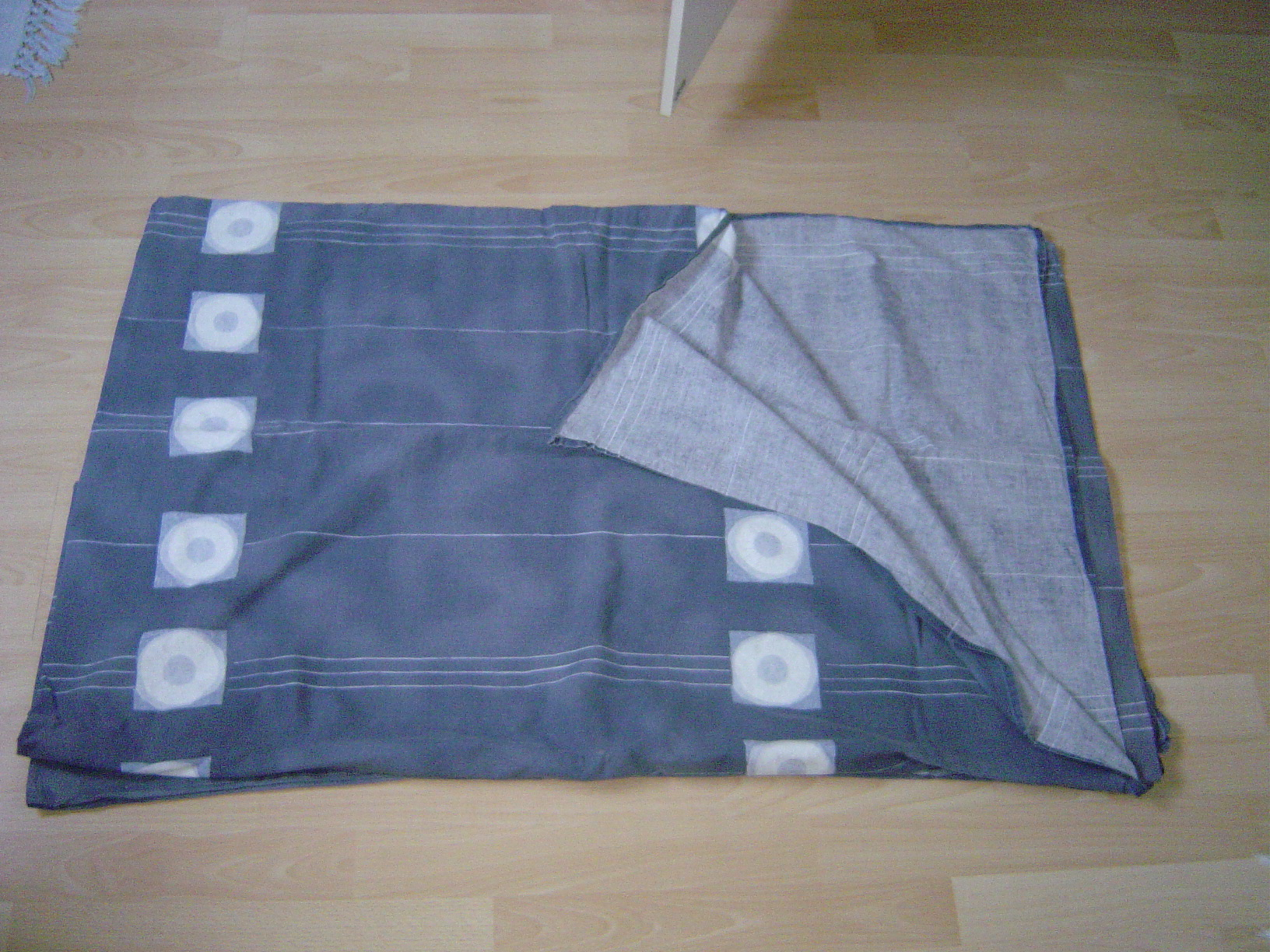 folded cover for a duvet